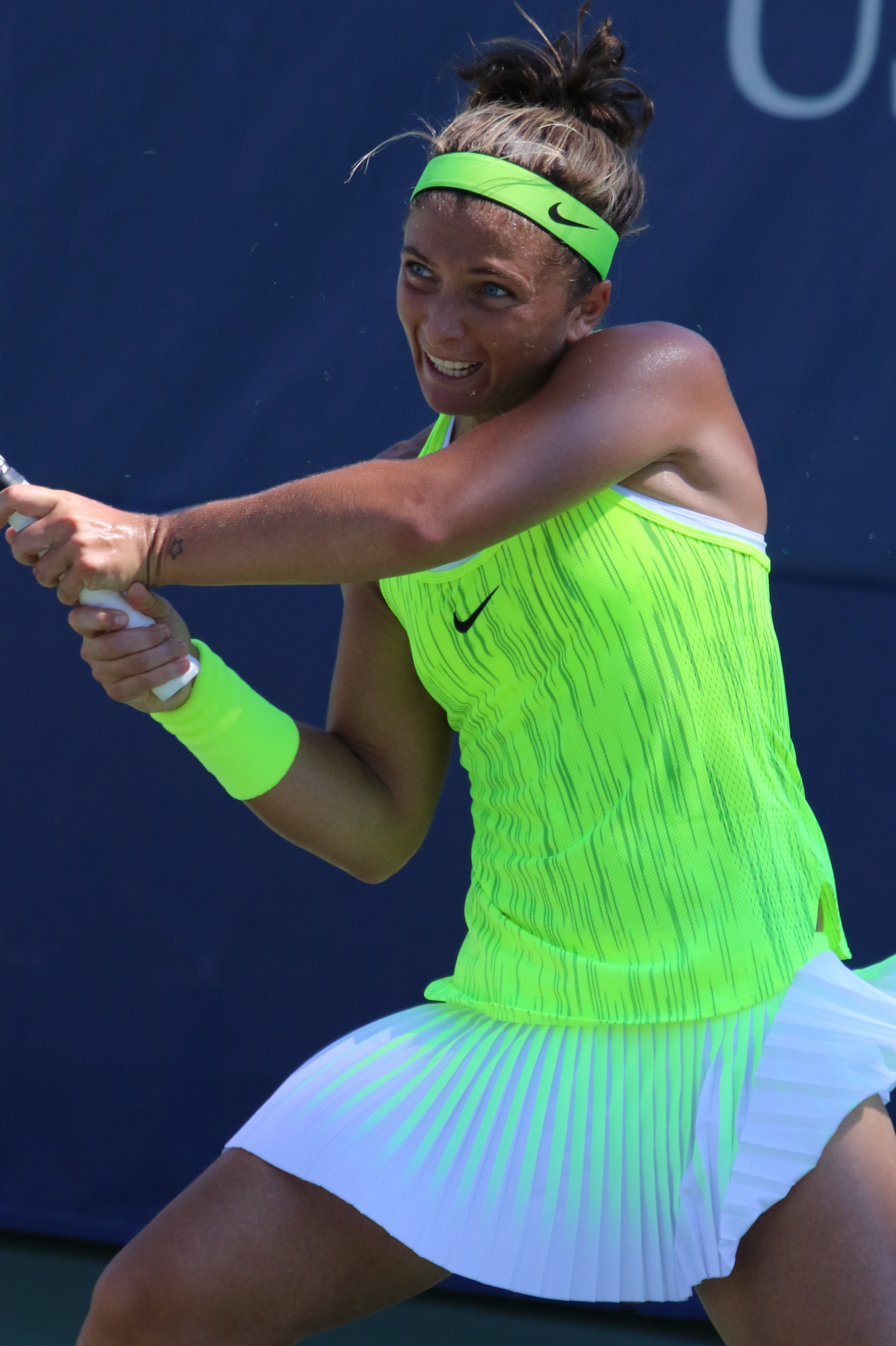 Errani US16 (3)